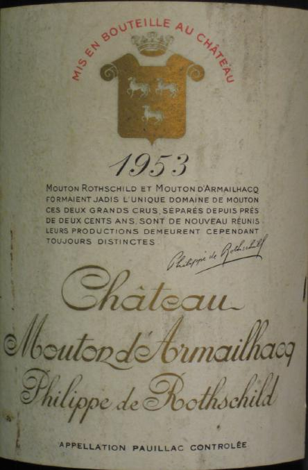 Château Mouton d'Armailhacq Philippe de Rothschild 1953 label